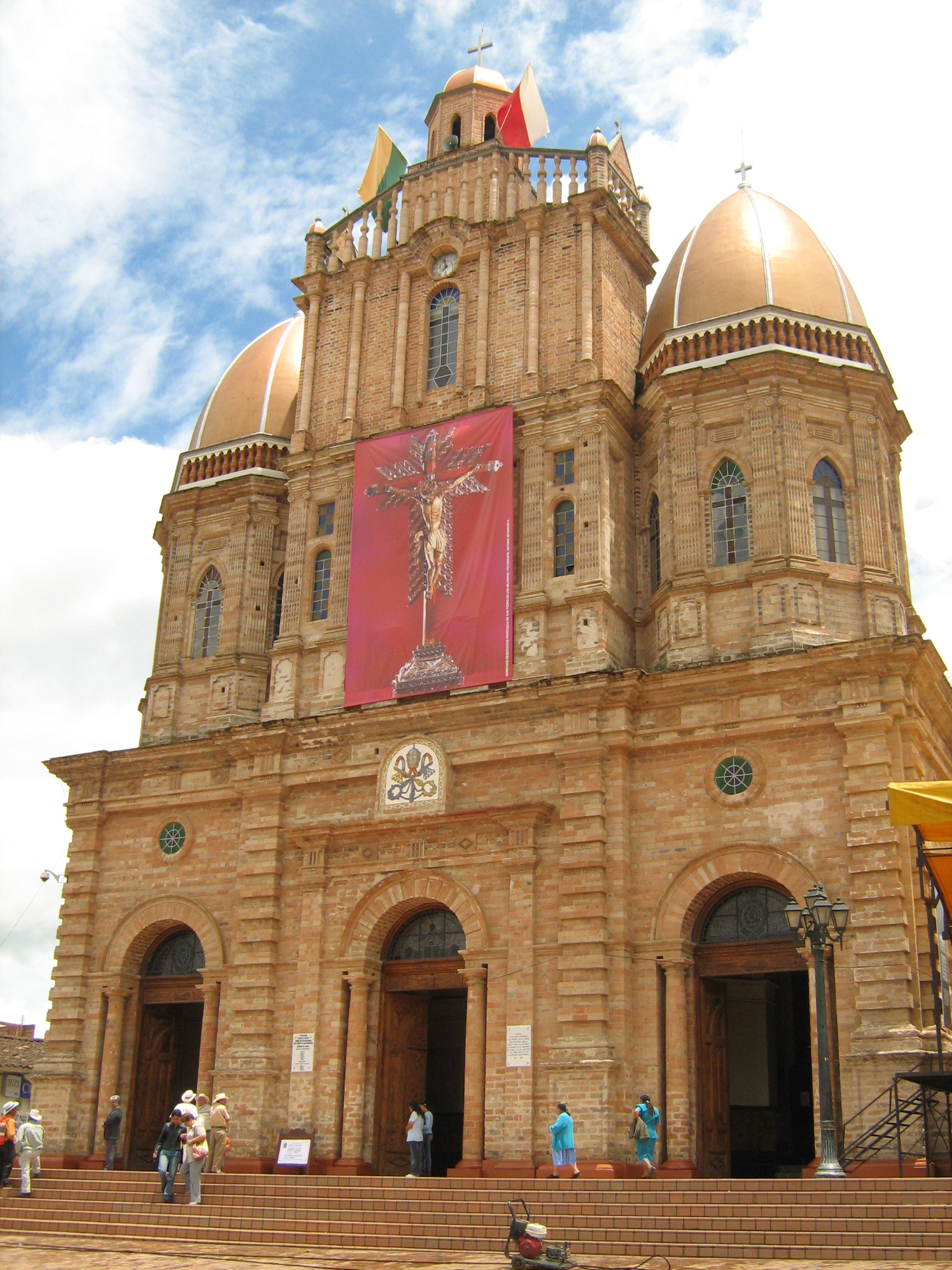 Fachada principal de la Basílica Menor del Señor de los Milagros del municipio de San Pedro de los Milagros, Antioquia. Colombia.